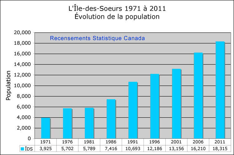 Évolution de la population de L'Île-des-Soeurs sur 40 ans